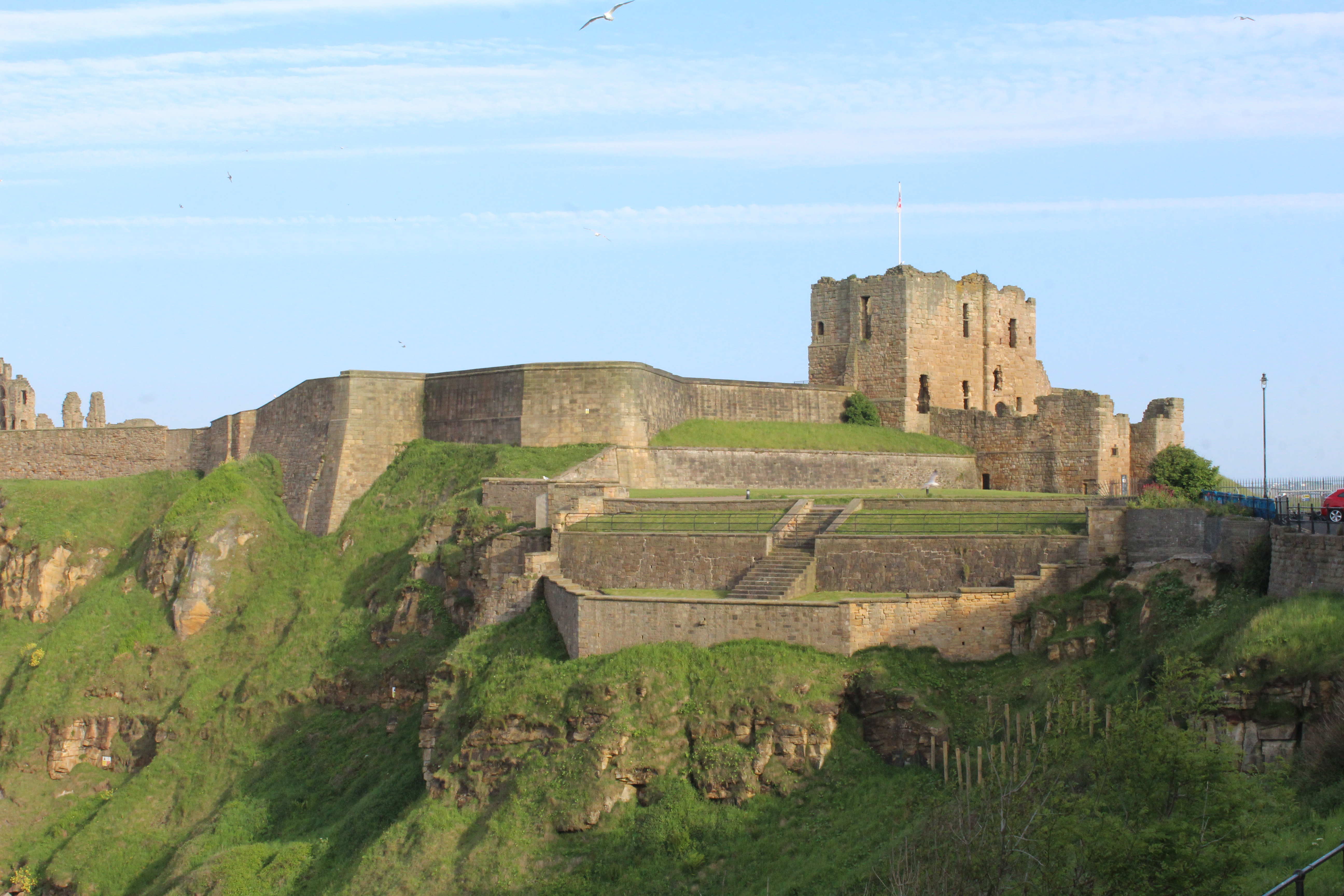 Prieuré et Château de Tynemouth, North Tyneside.